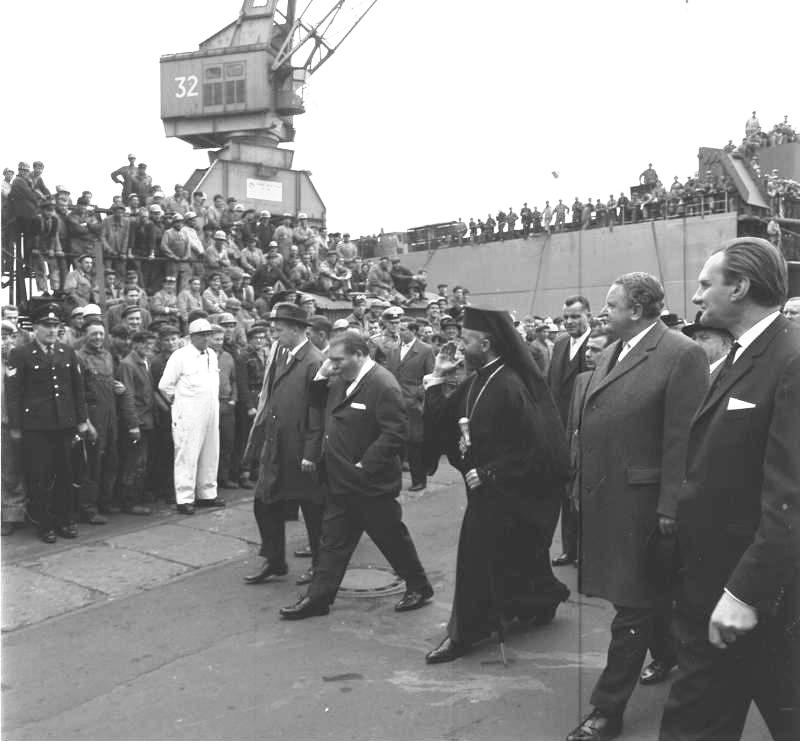 Staatsbesuch Zypern Besuch der Schlieker Werft Hamburg